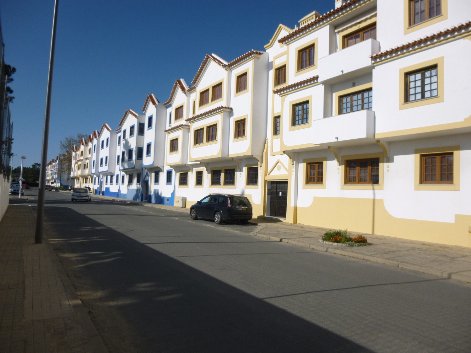 49 Milfontes